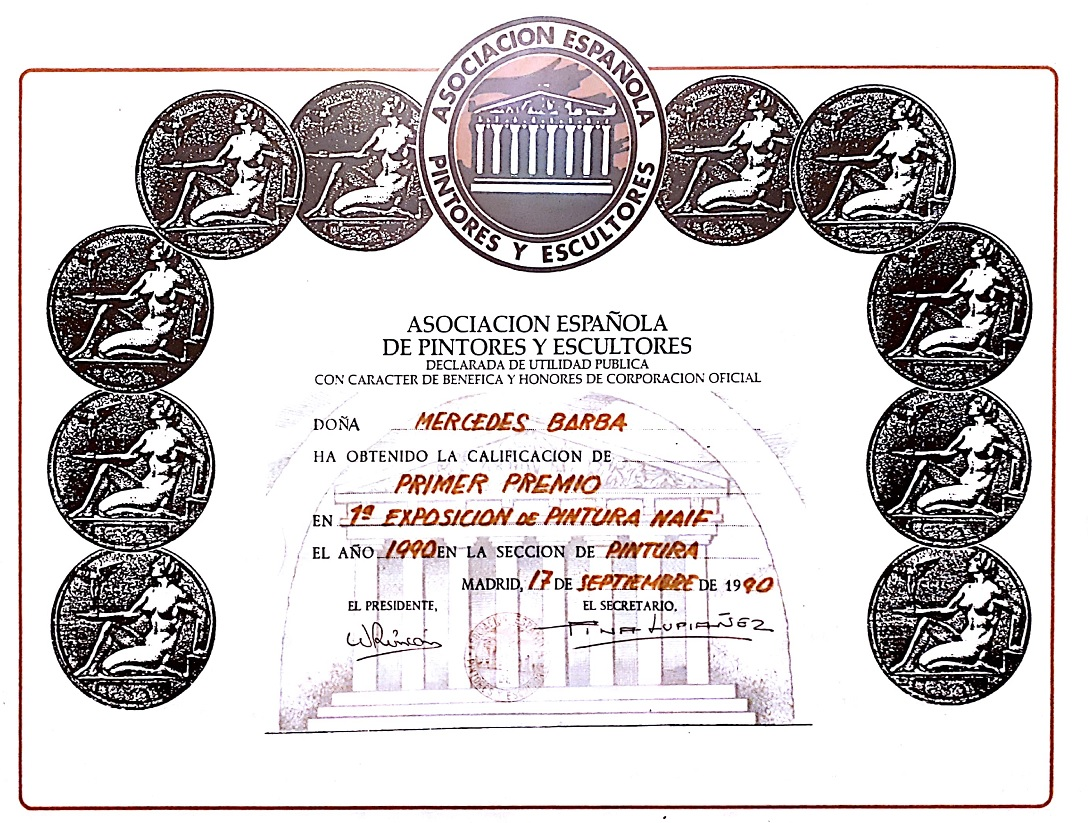 Mercedes Barba Álvarez- Primer Premio en I Exposición Pintura Naif en el año 1990, en la sección de Pintura, otorgado por la Asociación Española de Pintores y Escultores declarada de Utilidad Pública con carácter de Benéfica y Honores de Corporación Oficial, en Madrid el 17 de septiembre de 1990